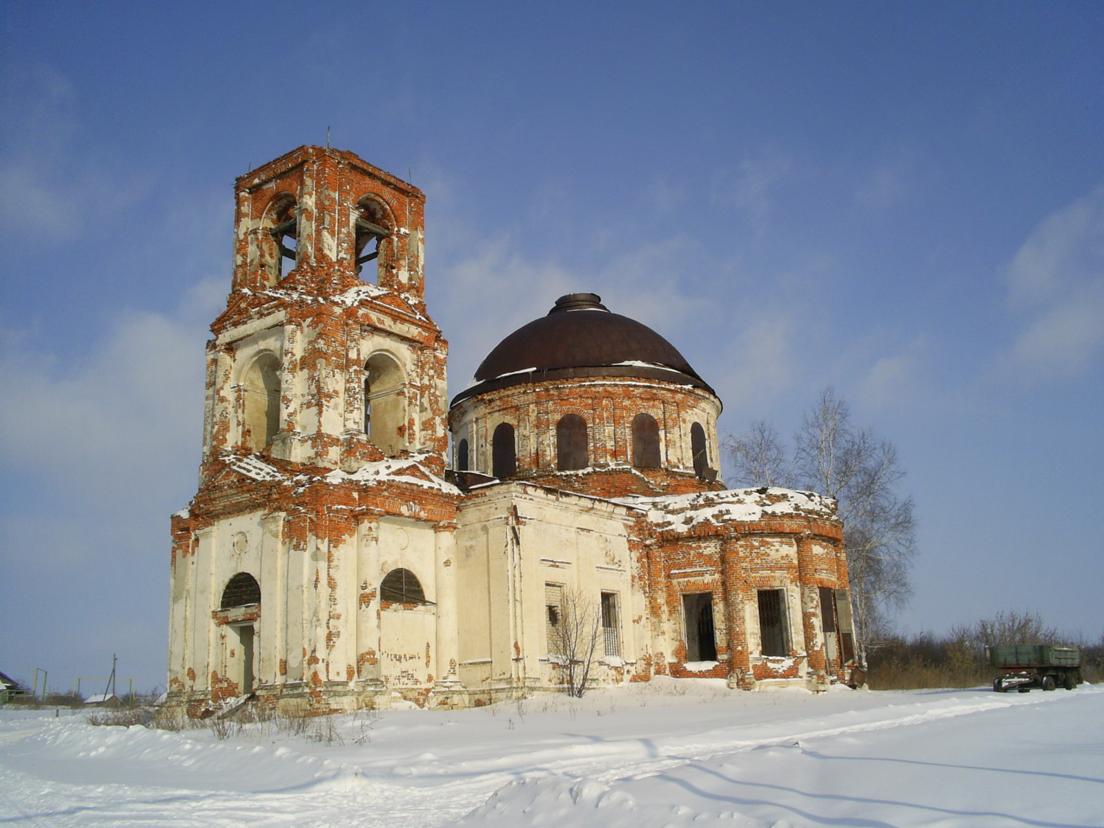 Здание храма Святой Троицы в селе Ожгибовка (Пильнинский район Нижегородской области, Россия).